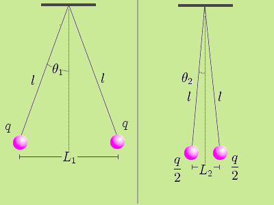 Representación de cargas de igual signo colgando de un hilo